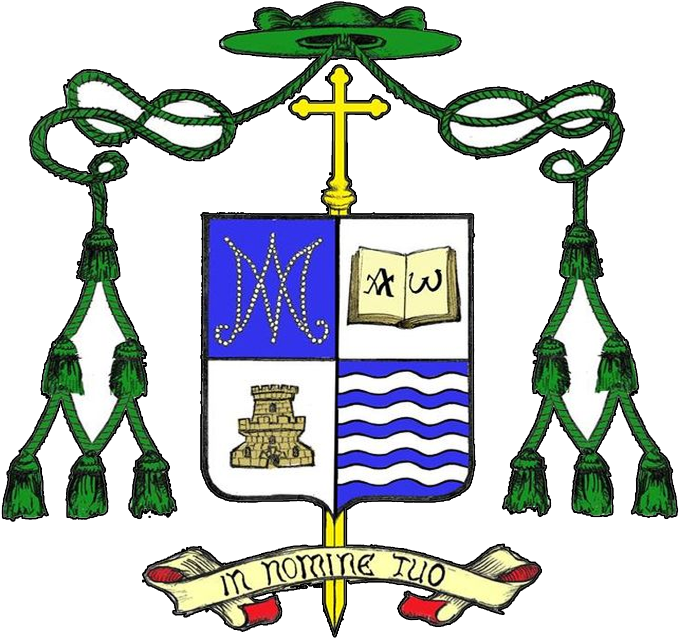 Escudo Episcopal de Monseñor Fernando Castro.